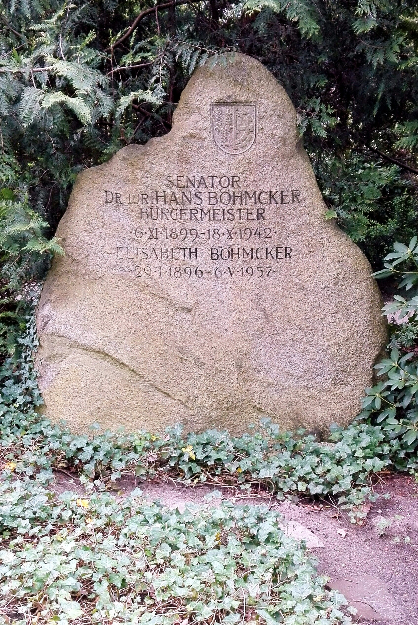 Grabstein Hans Böhmkers auf dem Burgtorfriedhof.